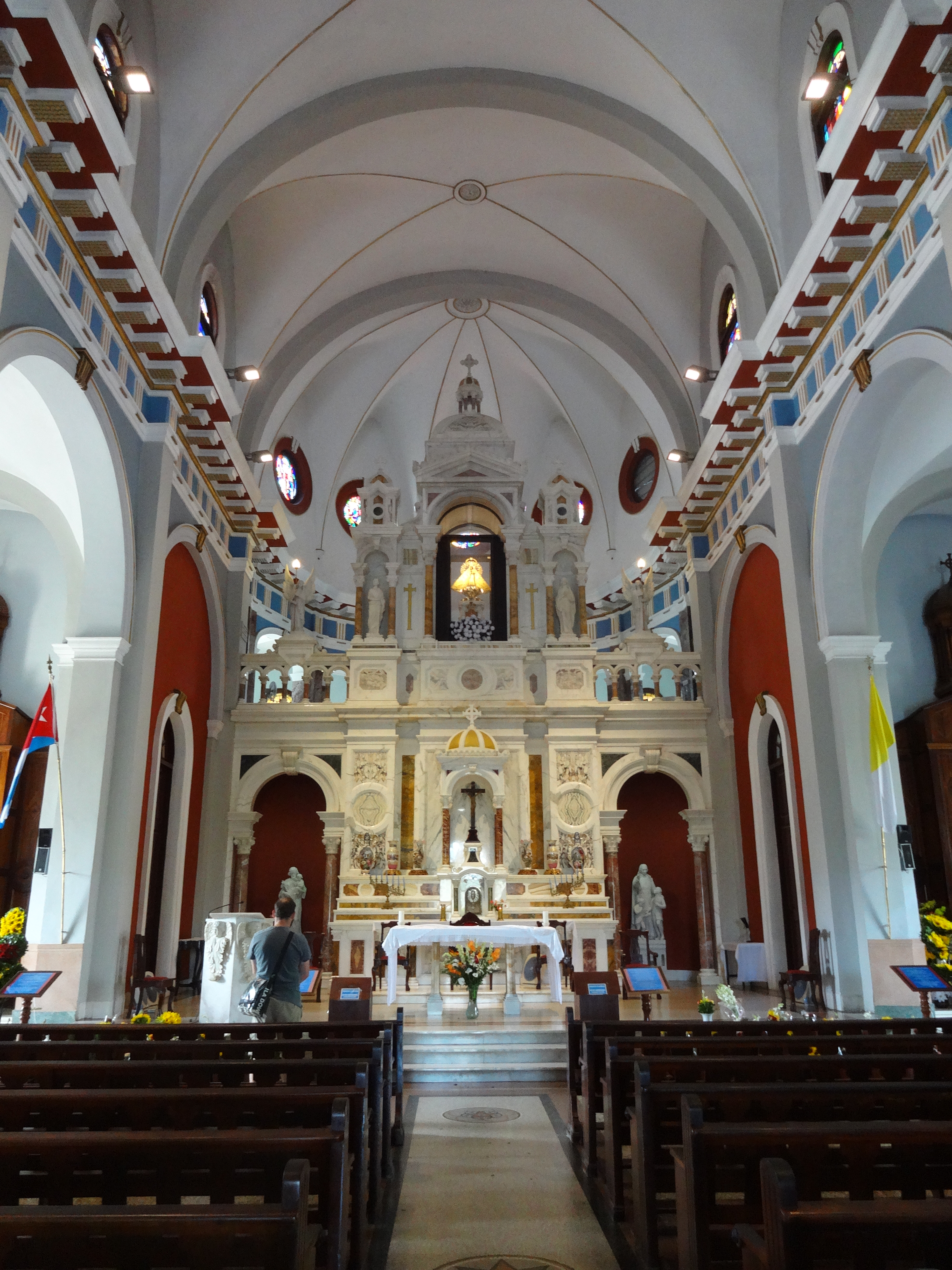 Kirche von El Cobre in der Nähe von Santiago de Cuba